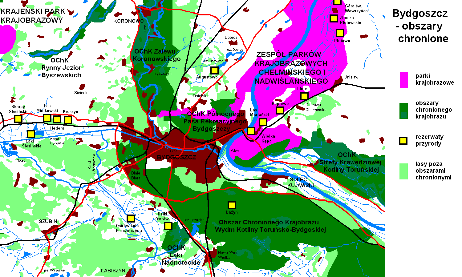 Obszary chronione: parki krajobrazowe, obszary chronionego krajobrazu i rezerwaty przyrody w okolicy Bydgoszczy na podstawie "Mapy ochrony przyrody województwa kujawsko-pomorskiego", 2004